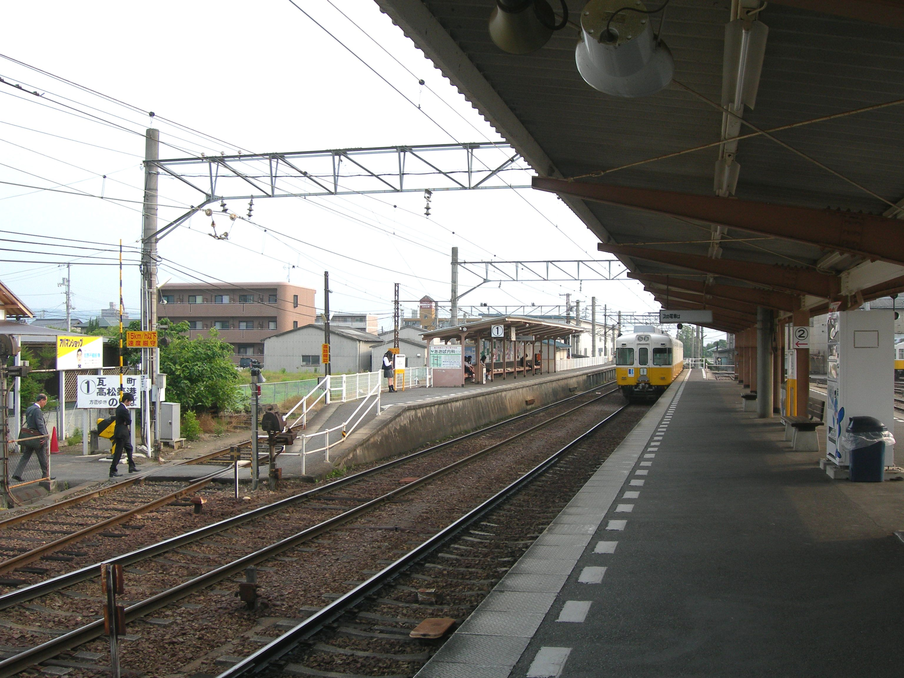 仏生山駅ホーム